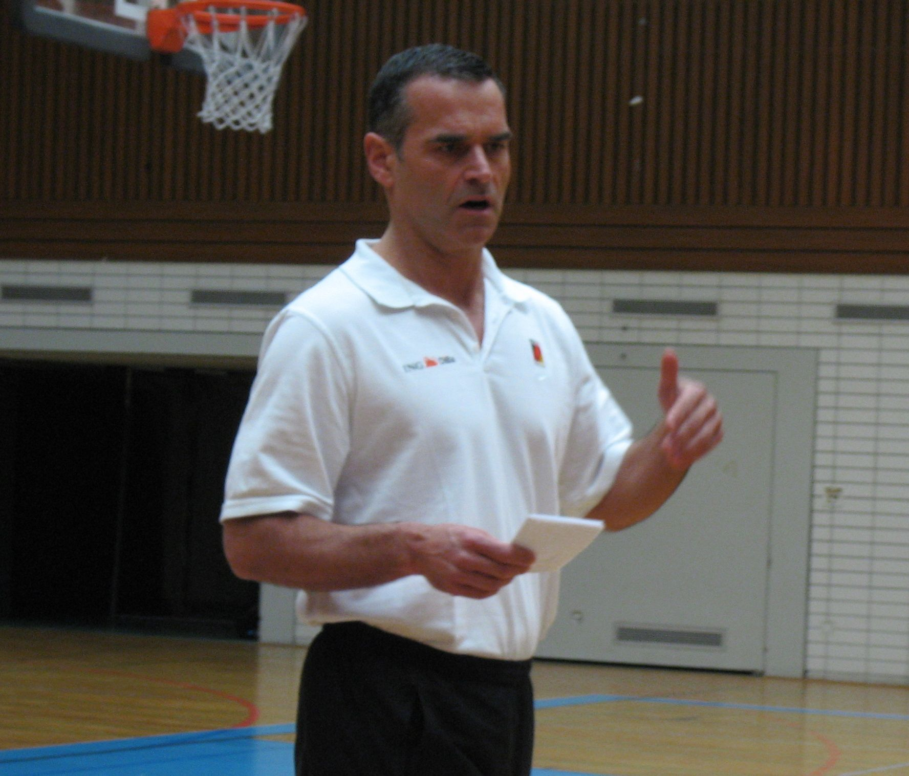 Dirk Bauermann während der Coach Clinic in Bamberg